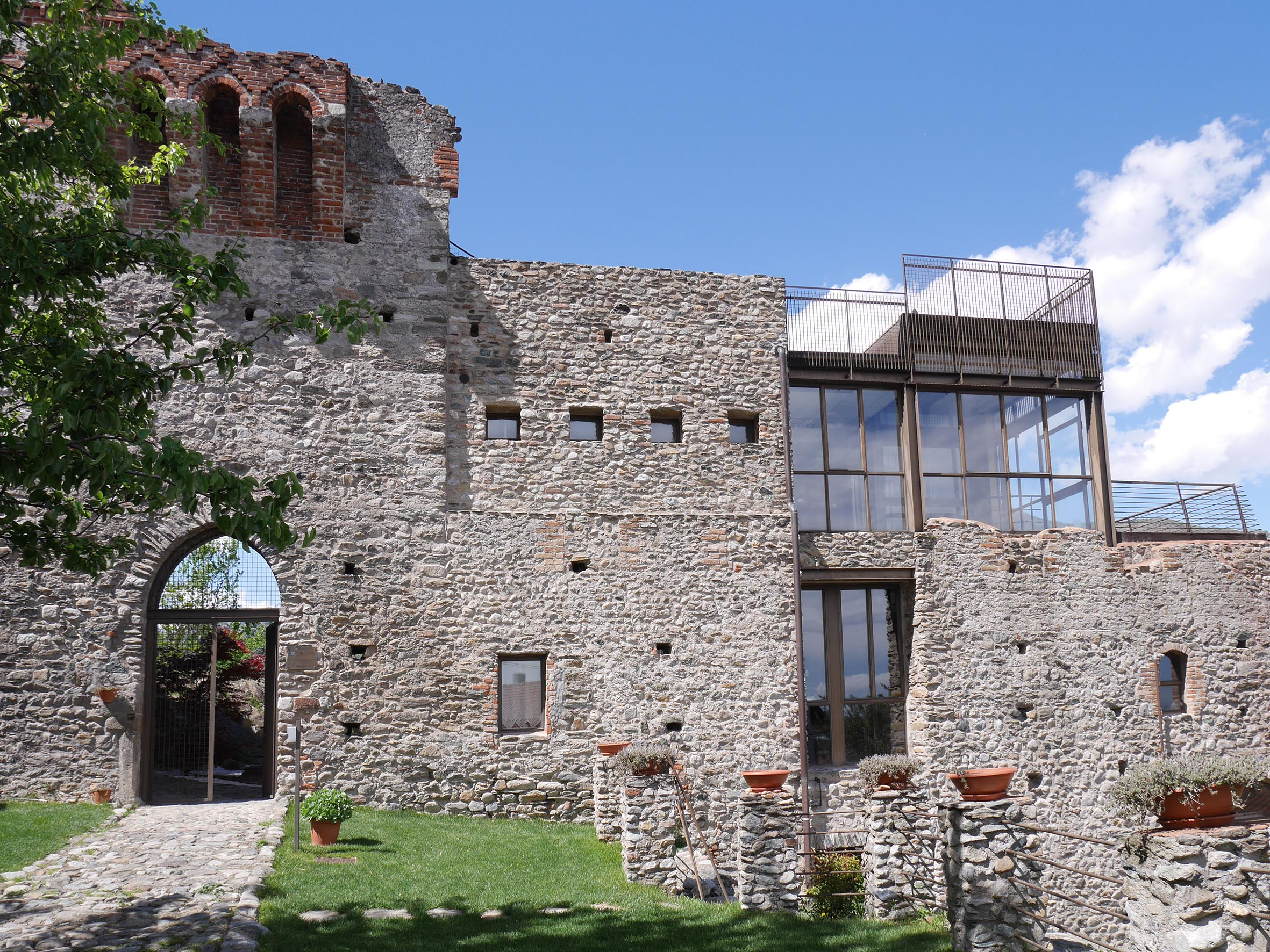 Ingresso del castello abbaziale